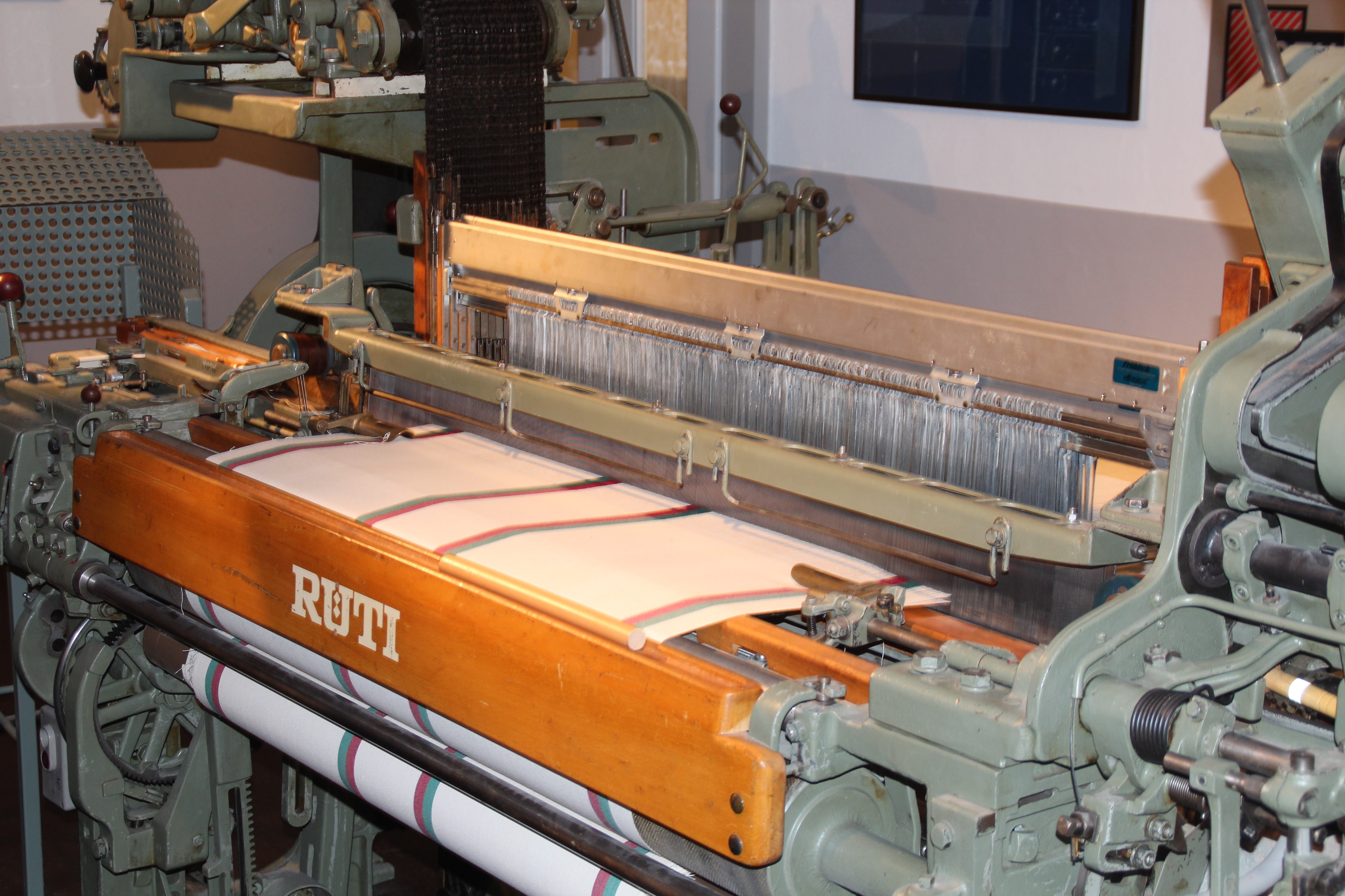 Schützenwebmaschine aus Rüti, ausgestellt in der Bleiche (Wald ZH), um 1950